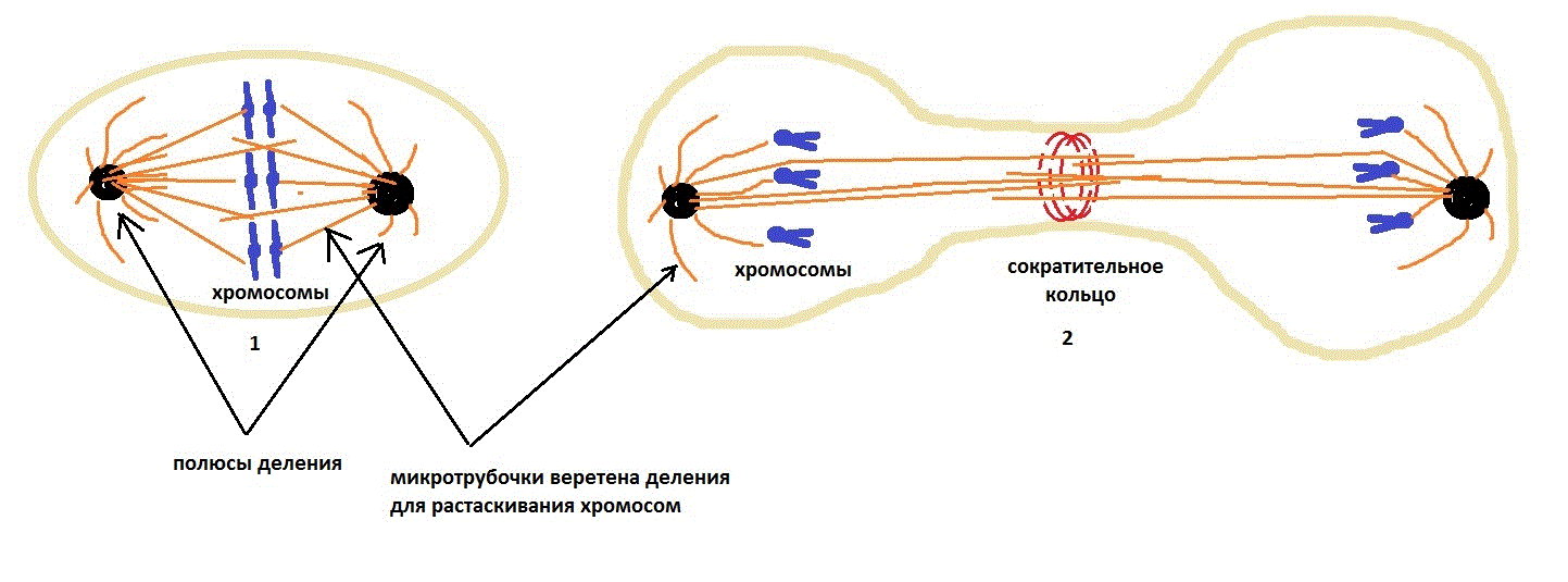 Сократительное кольцо – опоясывающее клетку белковое кольцо, предназначенное для механического разъединения клеток при делении.